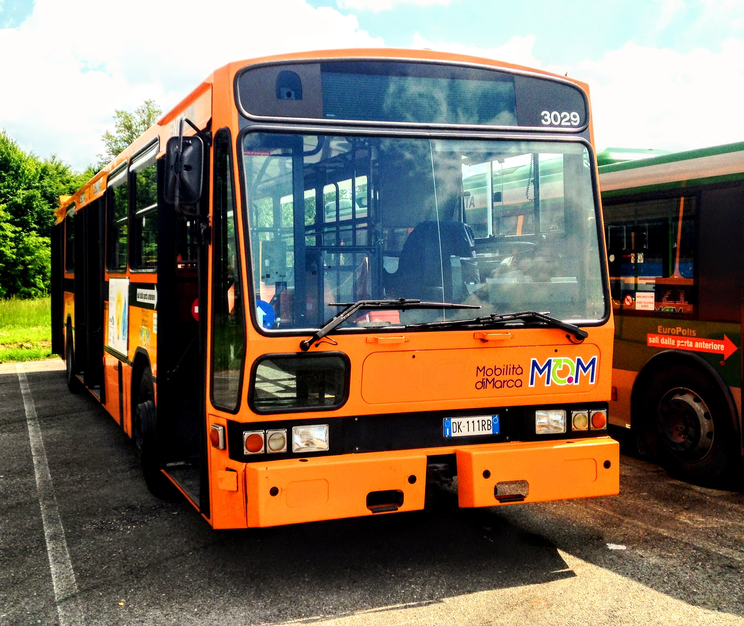 Autobus Inbus U240FT Siccar 178LU De Simon matricola 3029 di MOM-Mobilità di Marca (ex rete ACTT). Servizio urbano della città di Treviso, fuori servizio. Presso Autostazione Provvisoria Hub Ovest Mercato Ortofrutticolo, le Stiore (Treviso).